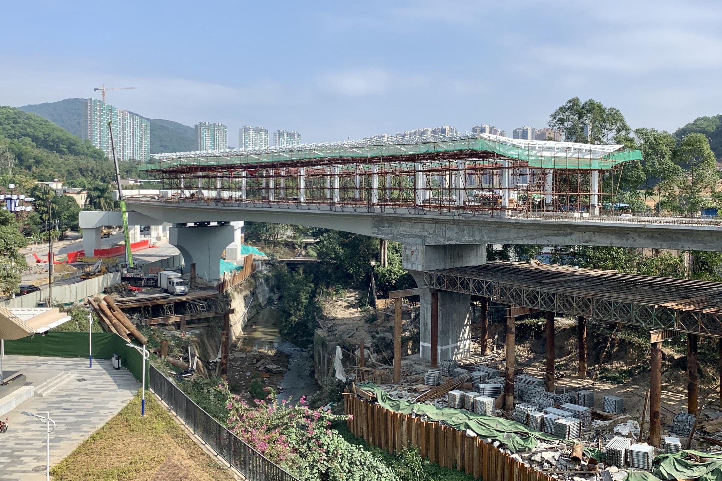 在建的黄埔有轨电车1号线长平站，摄于2019年12月